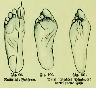 Fig. 99. Natürliche Fußform. Fig. 100 und 101. Durch schlechtes Schuhwerk verkrüppelte Füße.